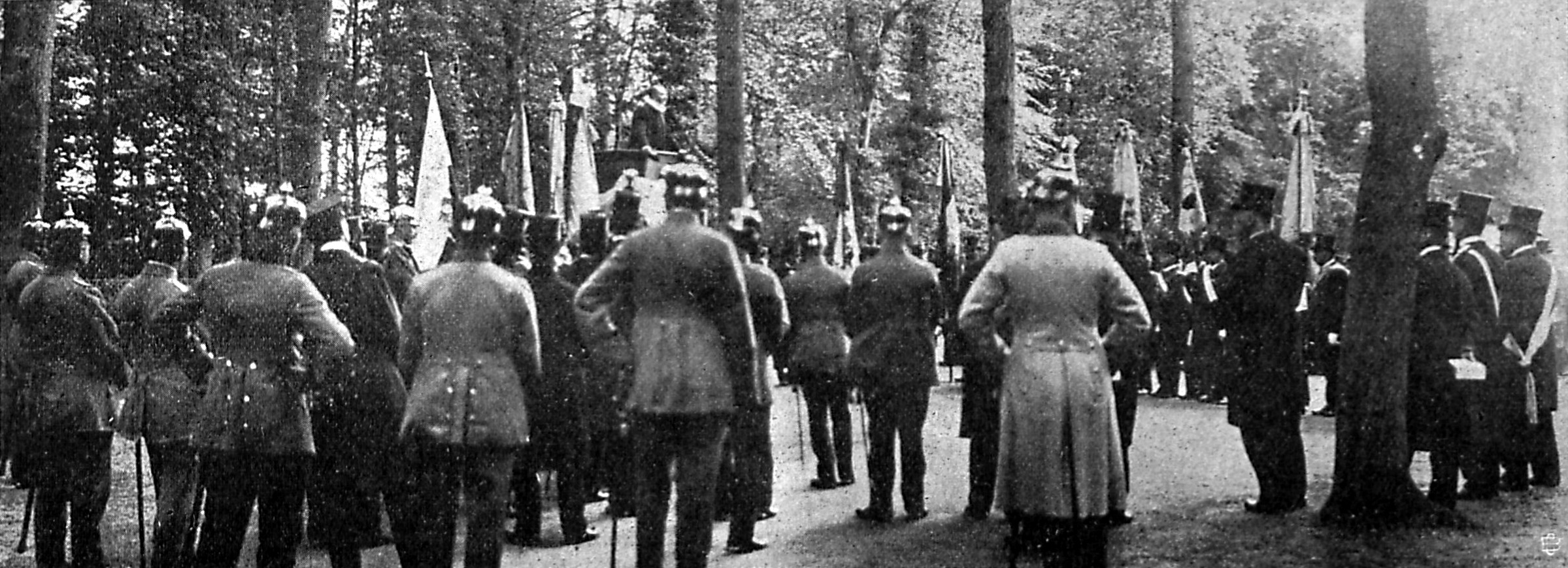 Gedächtnisfeier für die auf dem Ehrenfriedhof ruhenden Helden am 4. Juni. Pastor Ziesenitz hält die Gedächtnisrede.